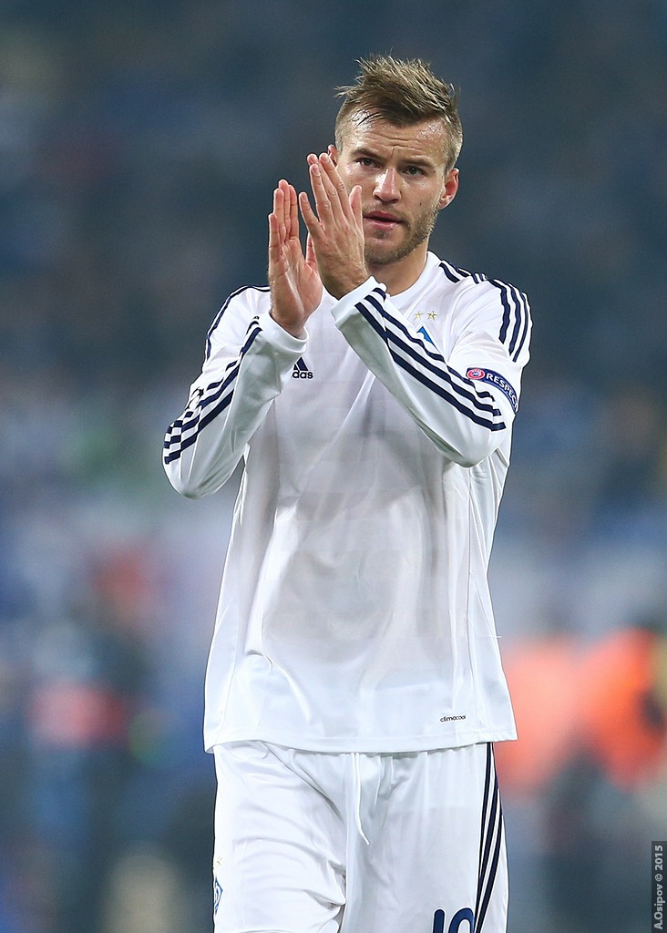 20.10.2015 Kyiv, Olimpiyskiy National Sports Complex Champions League. Group stage. FC Dynamo Kyiv - Chelsea - 0:0 Chelsea (4-2-3-1): Begovic; Zouma, Cahill, JT (c), Azpilicueta; Ramires, Matic; Willian, Fabregas (Oscar 75), Hazard; Diego Costa. Unused subs Blackman, Baba, Mikel, Traore, Kenedy, Falcao. Booked Zouma 67 Dynamo Kiev (4-1-4-1): Shovkovskiy; Danilo Silva, Khacheridi, Dragovic, Vida; Rybalka; Yarmolenko, Sydorchuk, Buyalskiy (Garmesh 83), Gonzalez; Kravets (Junior Moraes 78). Unused subs Rybka, Antunes, Petrovic, Gusev, Miguel Veloso. Booked Buyalskiy 65 20.10.2015 г.Киев. НСК "Олимпийский". Лига Чемпионов. Групповой этап Динамо — Челси 0:0 Динамо: Шовковский — Данило Силва, Драгович, Хачериди, Вида — Рыбалка, Буяльский (Гармаш, 83) — Ярмоленко, Сидорчук, Гонсалес — Кравец (Мораес, 78) Челси: Бегович — Аспиликуэта, Терри, Кэхилл, Зума — Матич, Рамирес — Виллиан, Фабрегас (Оскар, 75), Азар — Д. Коста Предупреждения: Буяльский — Зума